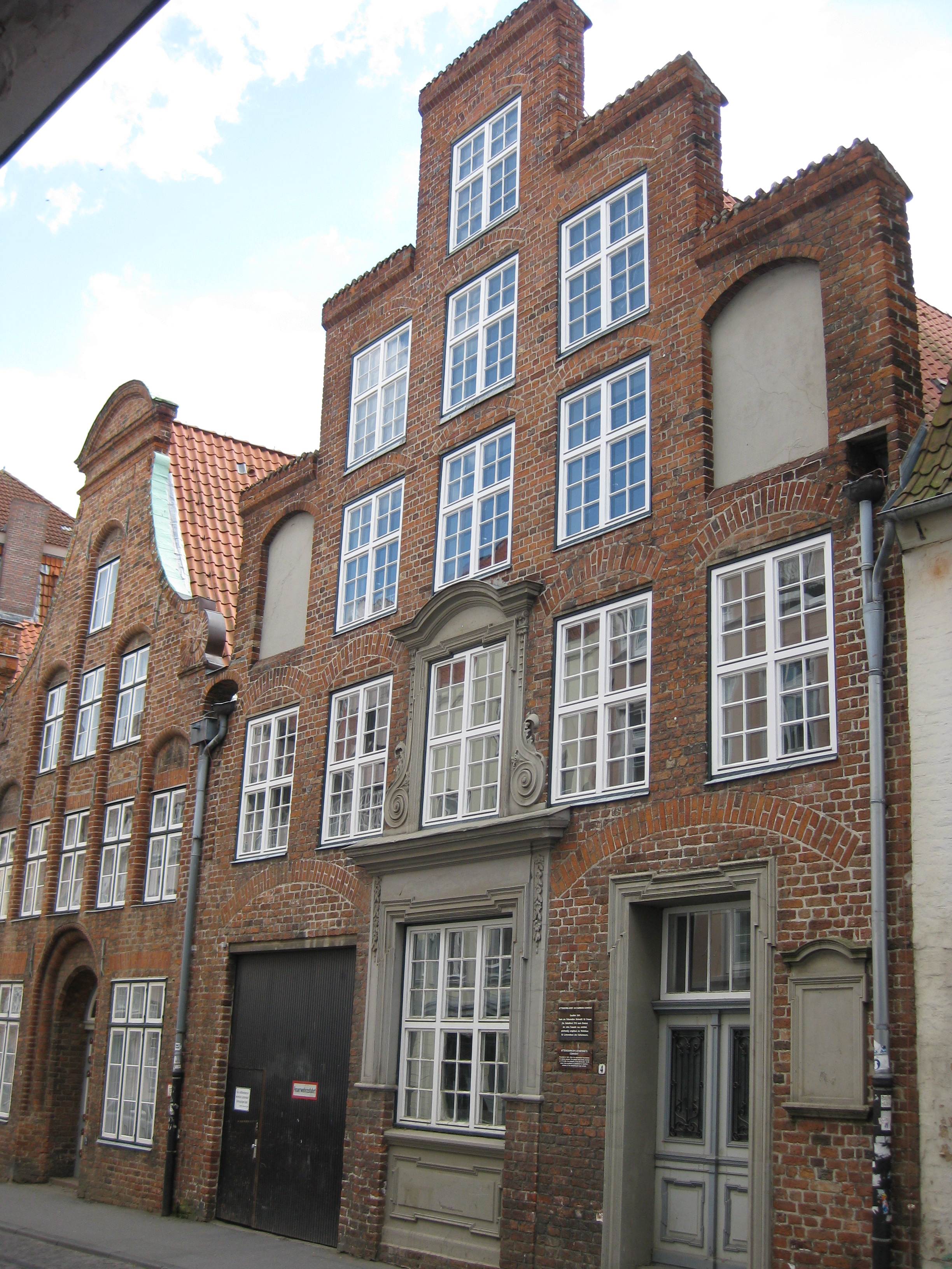 Attendornstift in der Glockengießerstraße 4 in Lübeck.